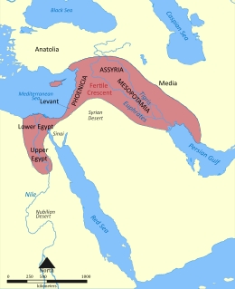 რუკა, რომელიც გვიჩვენებს უფრო დიდ ფართობს კვიპროსის ჩათვლით